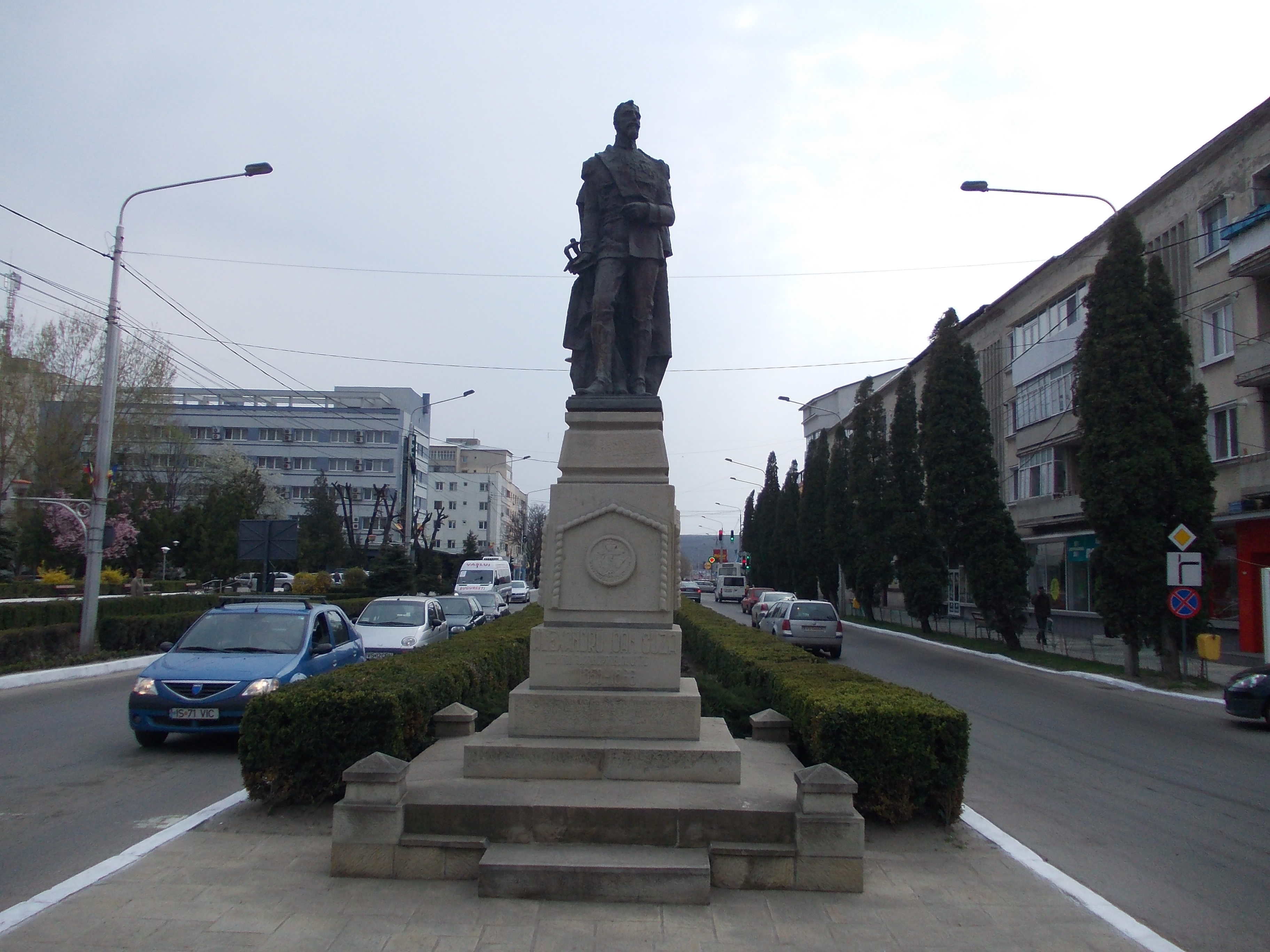 Statuia lui A.I. Cuza